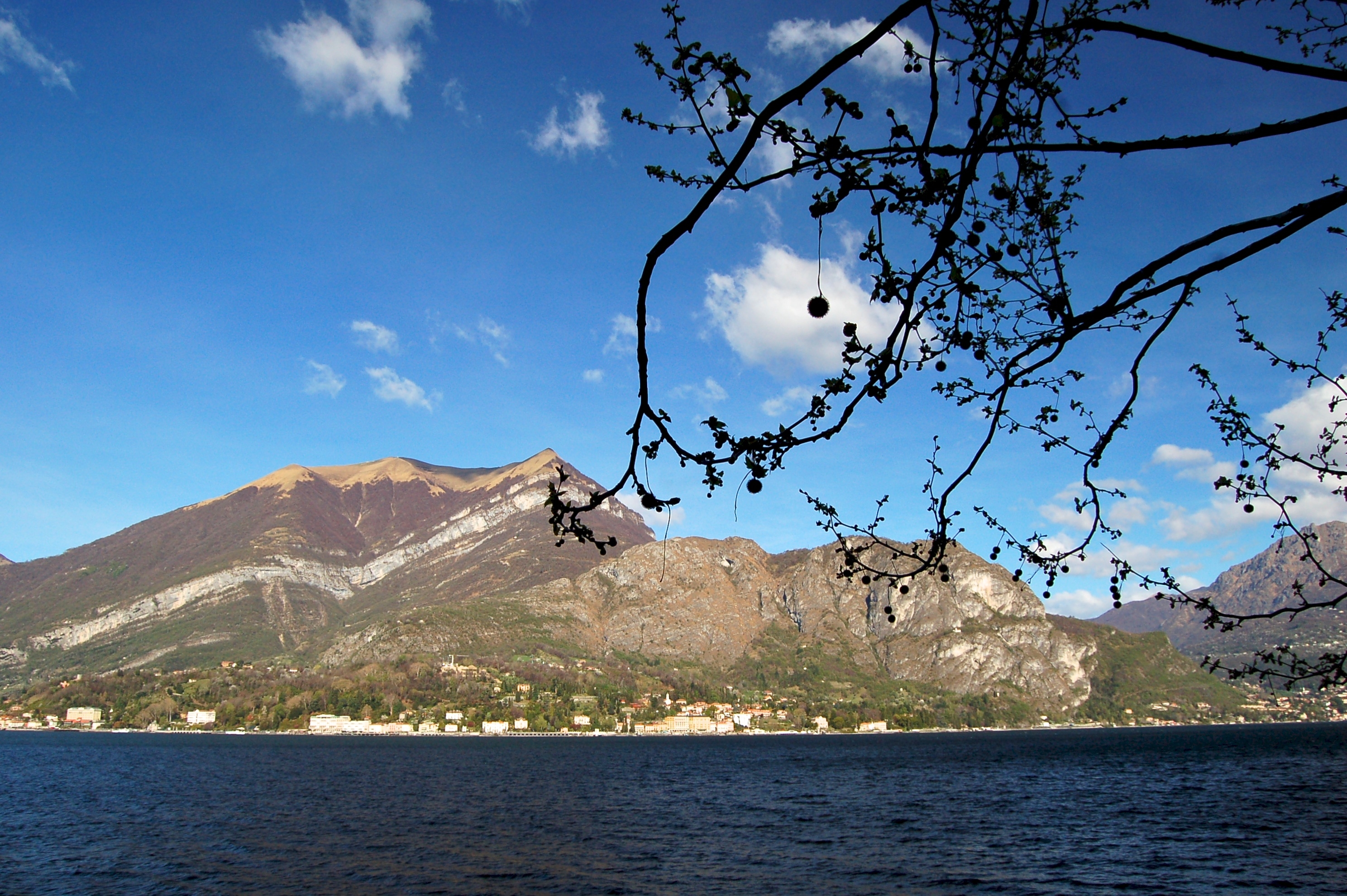 Veduta di Griante e del monte retrostante da Bellagio.